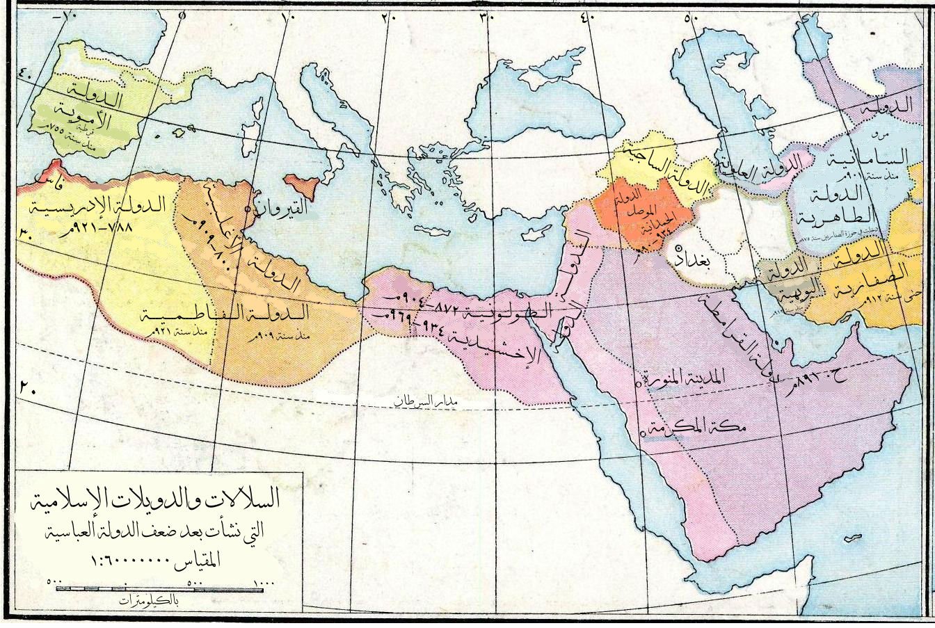 خارطة تُظهرُ الدولة العبَّاسيَّة سنة 945م عندما تفككت إلى عدَّة دويلات مُستقلَّة.